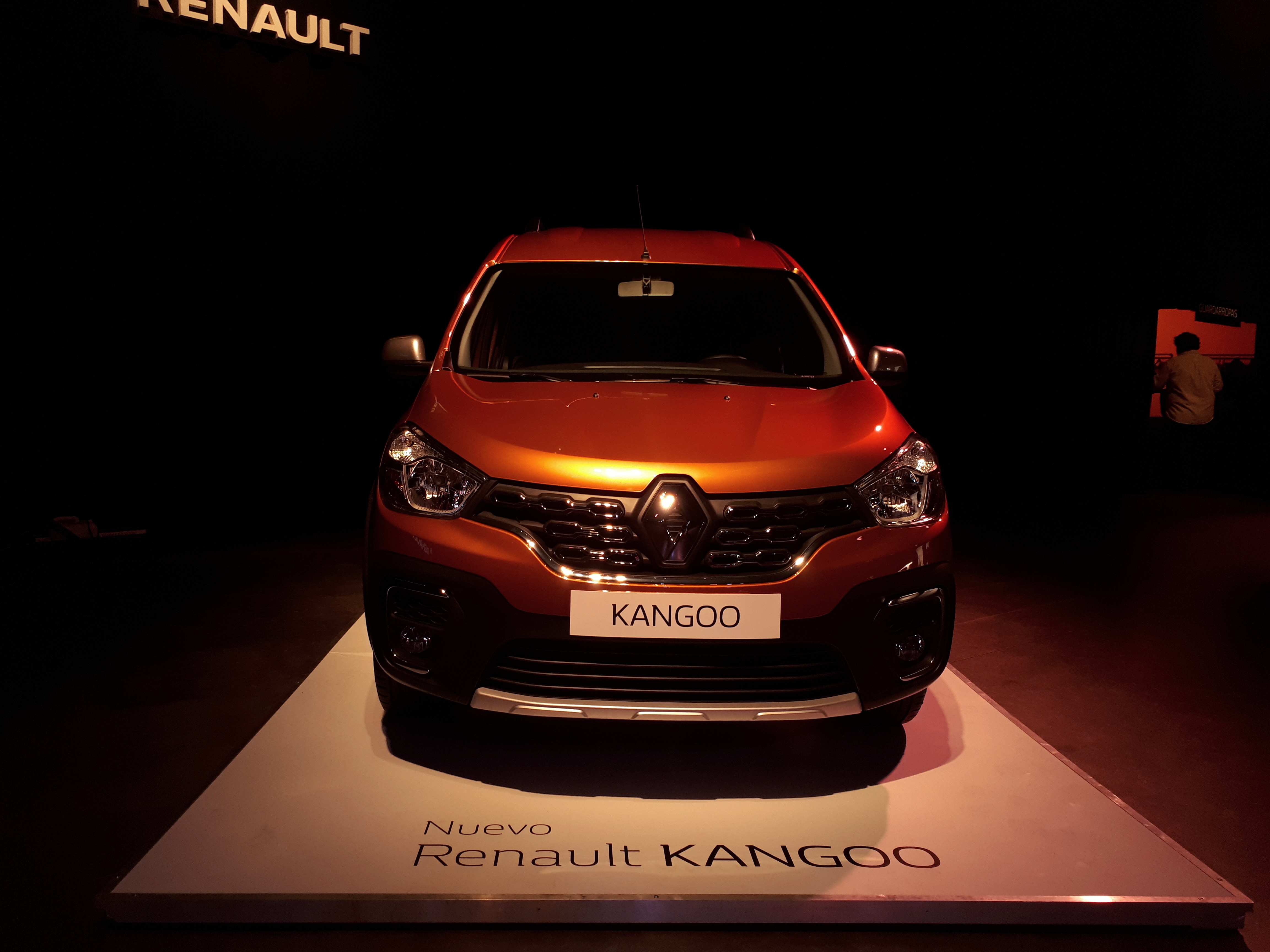 Nuevo Renault Kangoo Fabricada en Argentina.